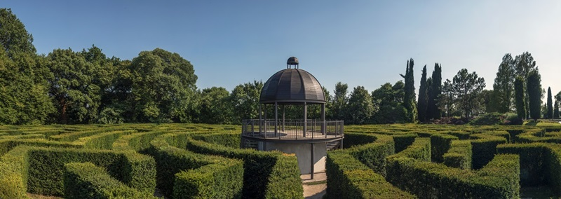 labirinto del Parco